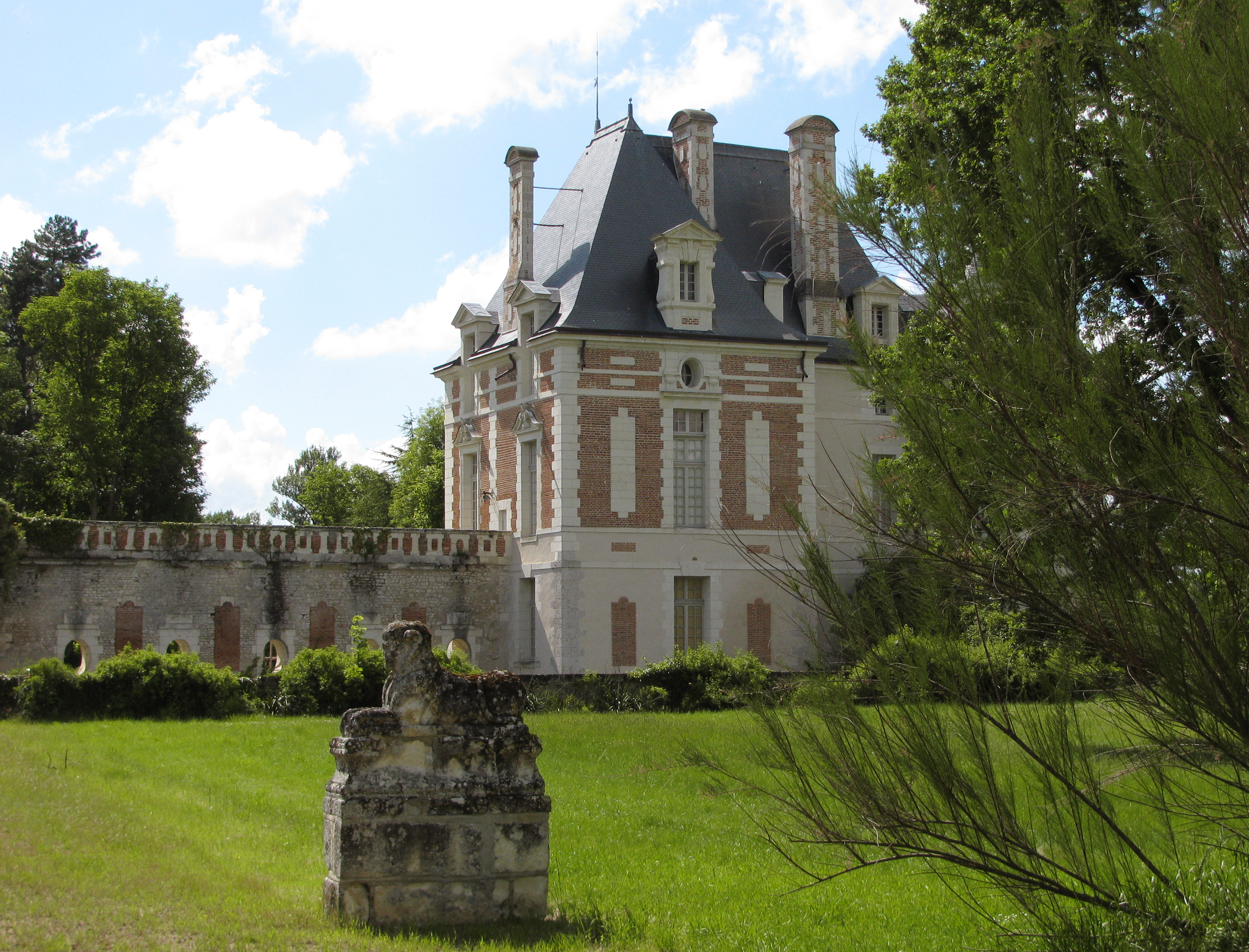 Schloss Selles im Département Loir-et-Cher/Frankreich - Erhaltene Teile der Schlossanlage: Renaissance-Pavillon Béthune und Arkadenmauer.